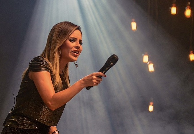 Sandy no Citibank Hall, São Paulo.